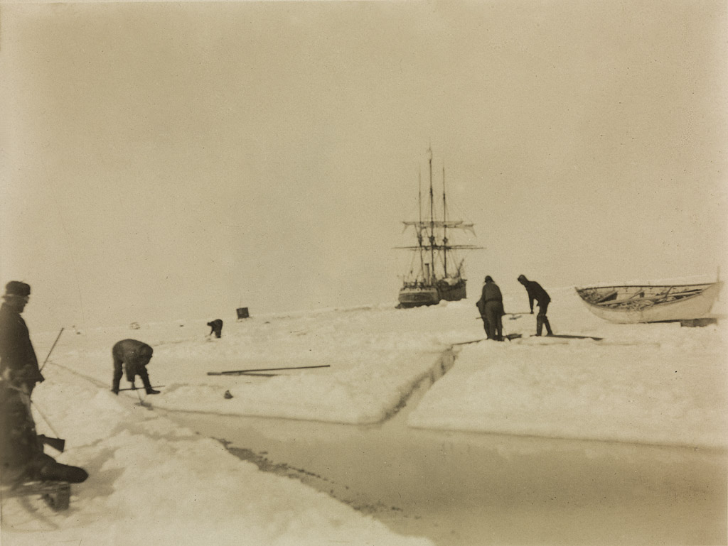 Tittel / Title: Uidentifiserte personer skjærer opp is rundt "Belgica" Motiv / Motif: Planen var å lage en kanal gjennom isen for å frigjøre "Belgica", før isen tvang mannskapet til enda en overvintring. Dato / Date: januar 1899 Fotograf / Photographer: Frederick A. Cook (1865-1940) Sted / Place: Antarktis Eier / Owner Institution: Nasjonalbiblioteket / National Library of Norway Lenke / Link: " Bildesignatur / Image Number: bldsa_NBRA0007